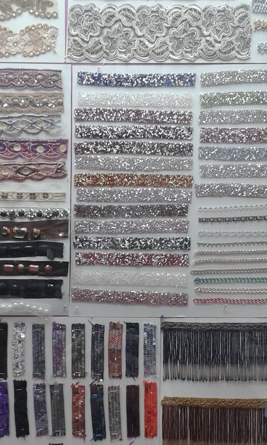 mercerie